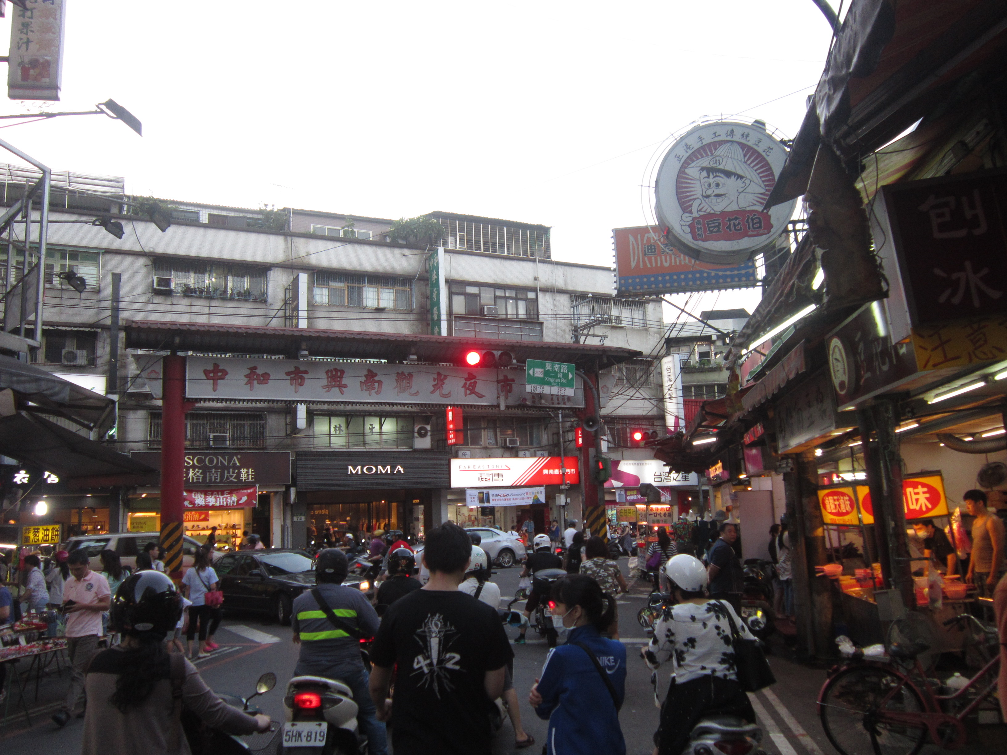 中文（台灣）: 中和興南夜市興南路出入口。